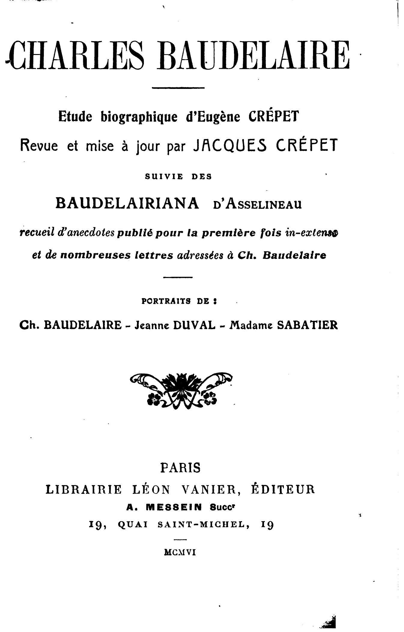 Etude biographique d'Eugène Crépet (1827-1892) sur l'écrivain Charles Baudelaire. (1856)